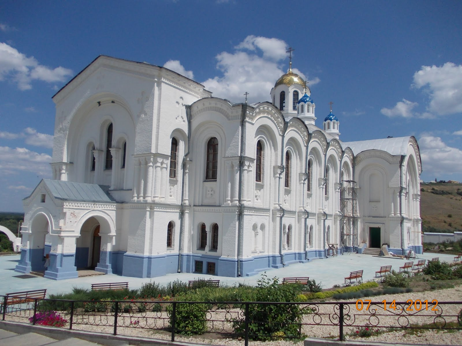 Serafimovichsky District, Volgograd Oblast, Russia